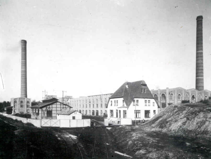 Deutsche Carbid-AG - heute Chemiepark Knapsack, Huerth, Germany